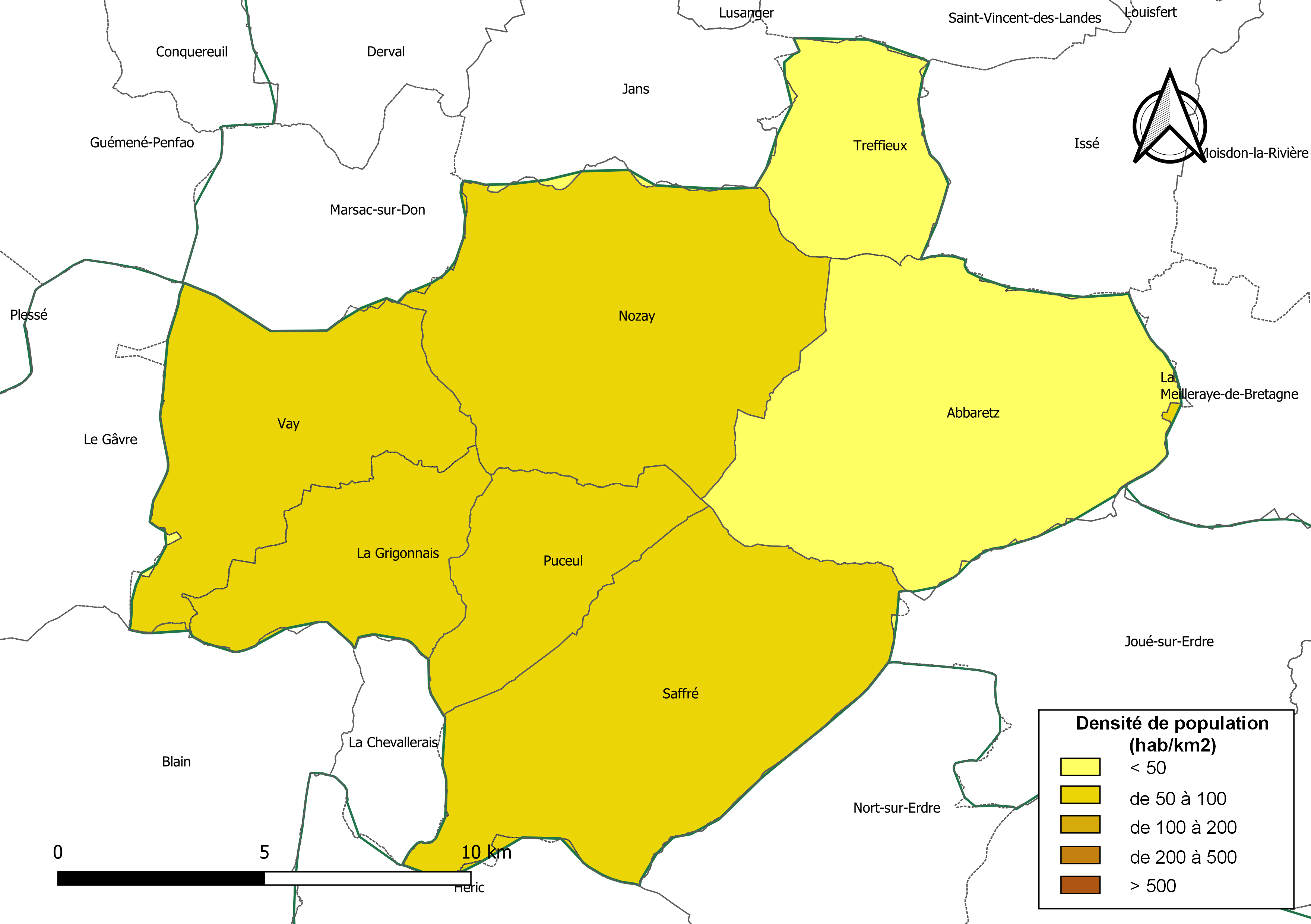 Carte des densités de population (millésimée 2016) des communes de la Communauté de communes de Nozay, département de la Loire-Atlantique, France. Composition au 1er janvier 2019.